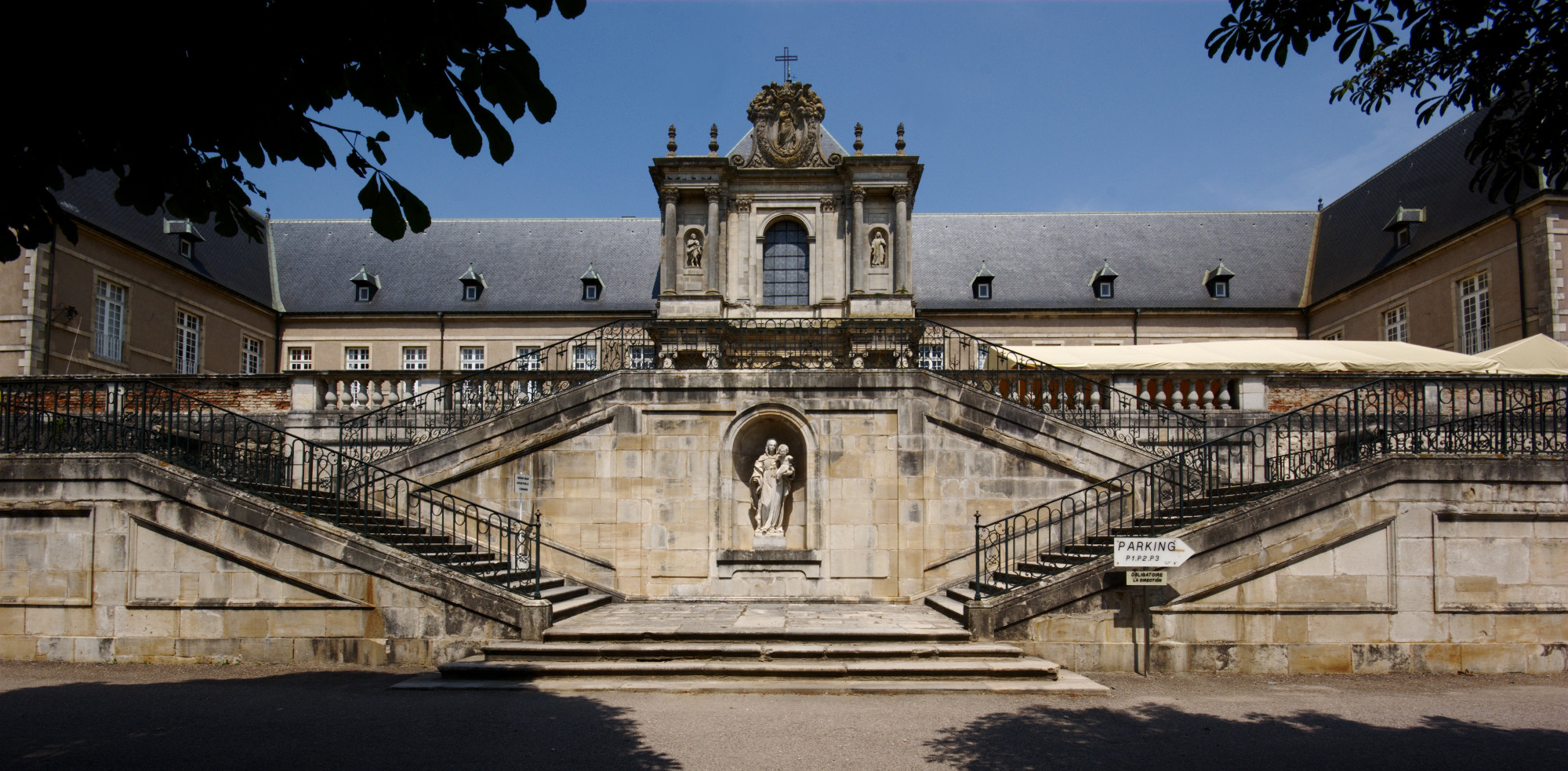 Chartreuse de Bosserville, Art-sur-Meurthe, Meurthe-et-Moselle, Lorraine, France